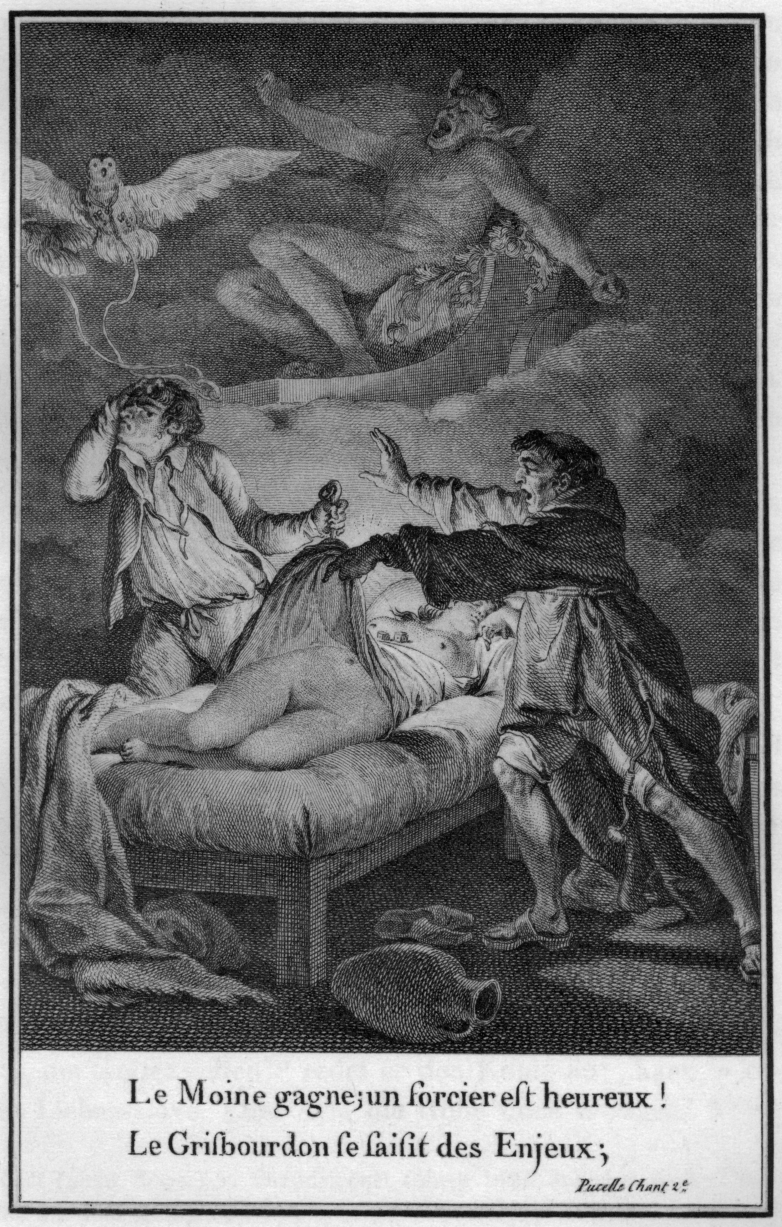 Jean-Michel Moreau, Illustration zu Voltaire: Die Jungfrau, Ein erotisch-satirischer Roman aus der Zeit Karl VII., Tafel 2 Licensing This is a faithful photographic reproduction of a two-dimensional, public domain work of art. The work of art itself is in the public domain for the following reason: This work is in the public domain in its country of origin and other countries and areas where the copyright term is the author's life plus 100 years or less. You must also include a United States public domain tag to indicate why this work is in the public domain in the United States. This file has been identified as being free of known restrictions under copyright law, including all related and neighboring rights. The official position taken by the Wikimedia Foundation is that "faithful reproductions of two-dimensional public domain works of art are public domain". This photographic reproduction is therefore also considered to be in the public domain in the United States. In other jurisdictions, re-use of this content may be restricted; see Reuse of PD-Art photographs for details.